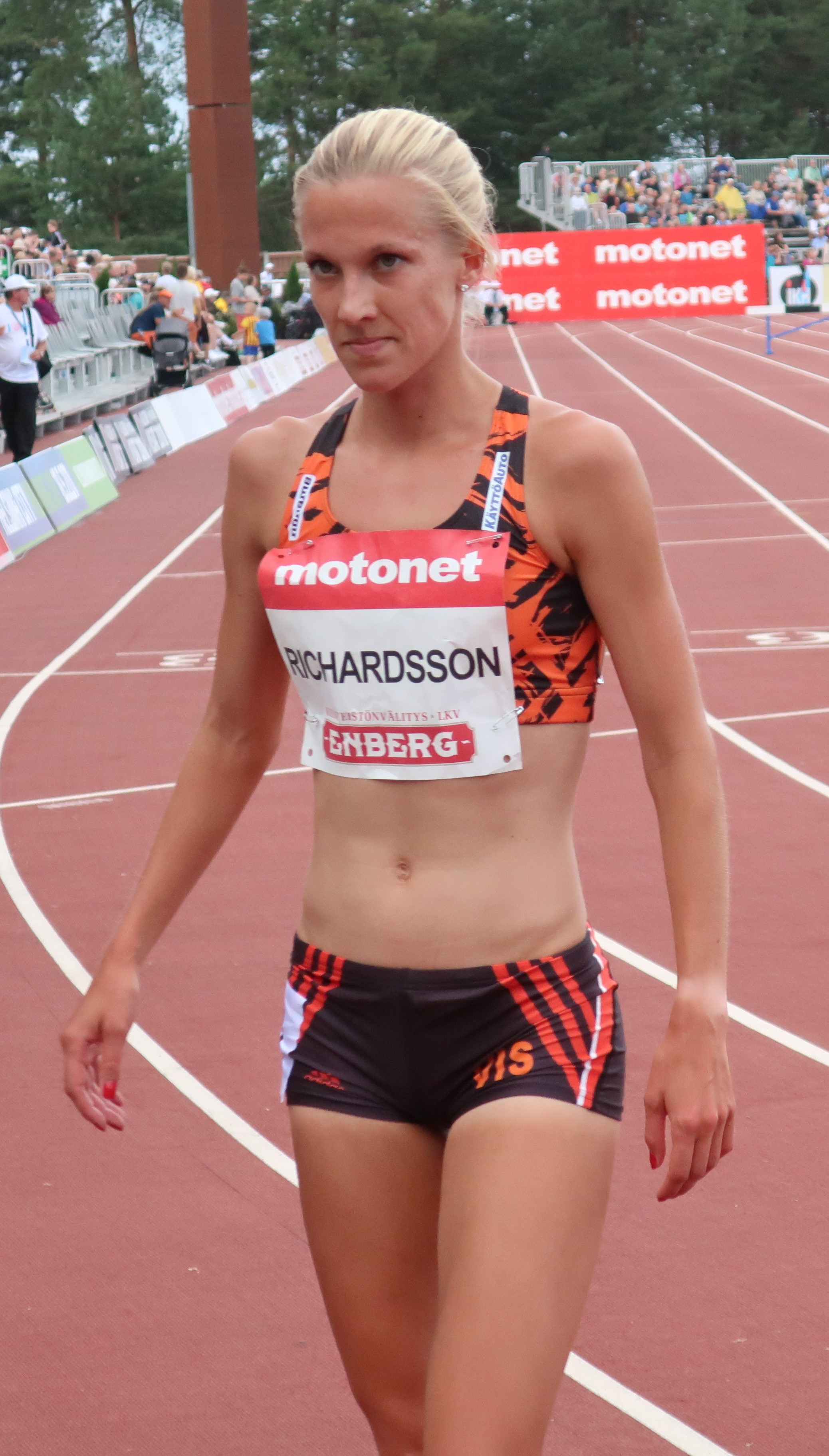 Camilla Richardsson Jyväskylän Kalevan kisoissa 2018 estejuoksun voittajana.